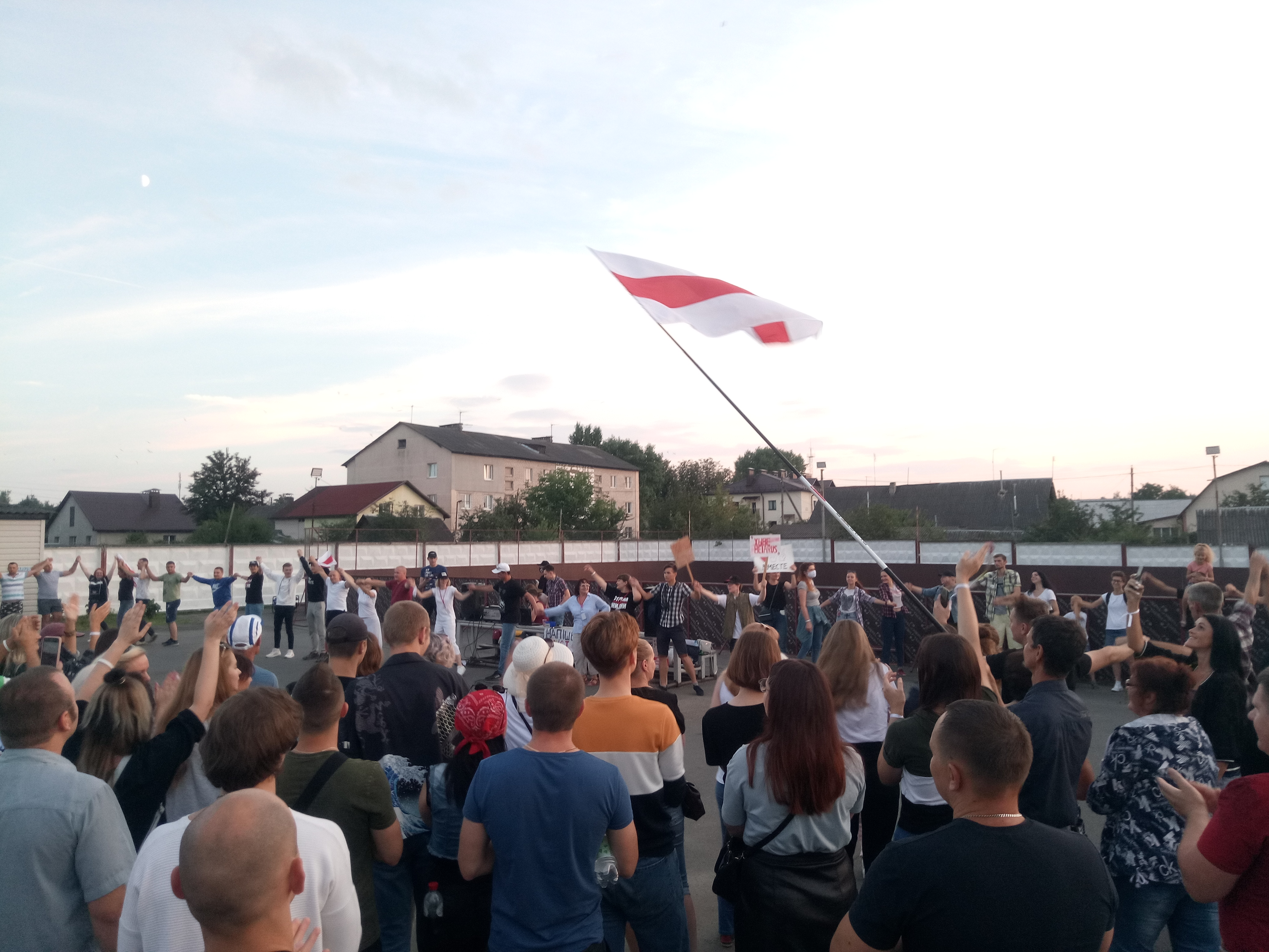 Мар'іна Горка, 28 ліпеня 2020 года. Перадвыбарная агітацыя